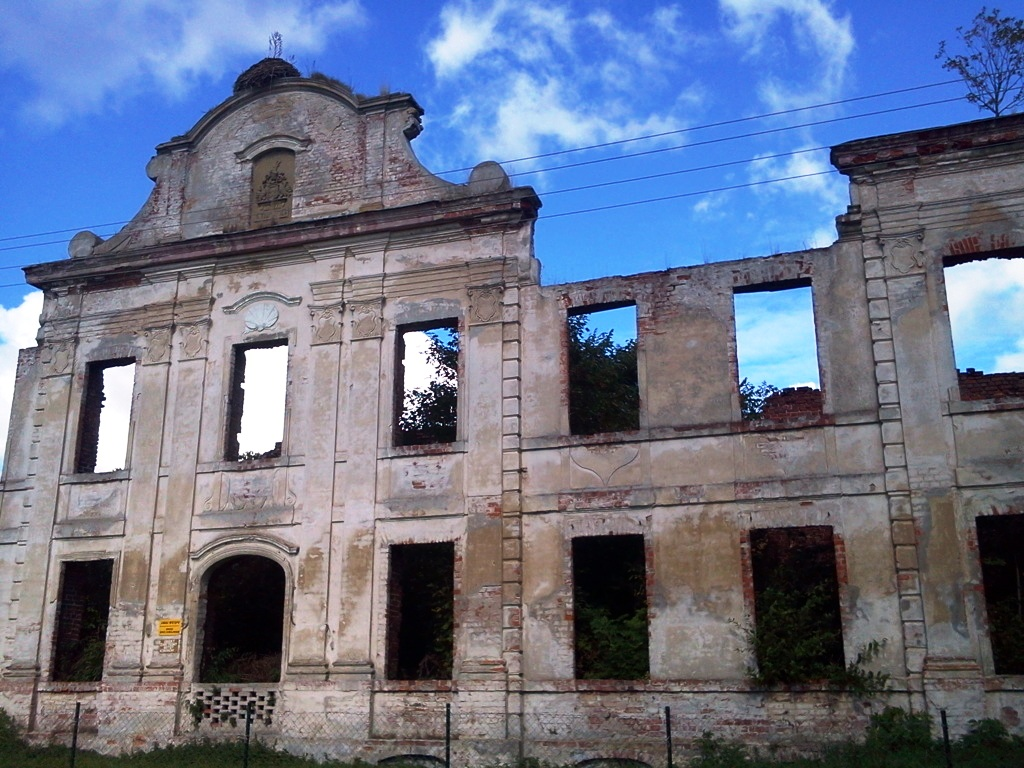 Pałac w Starogardzie - główny ryzalit